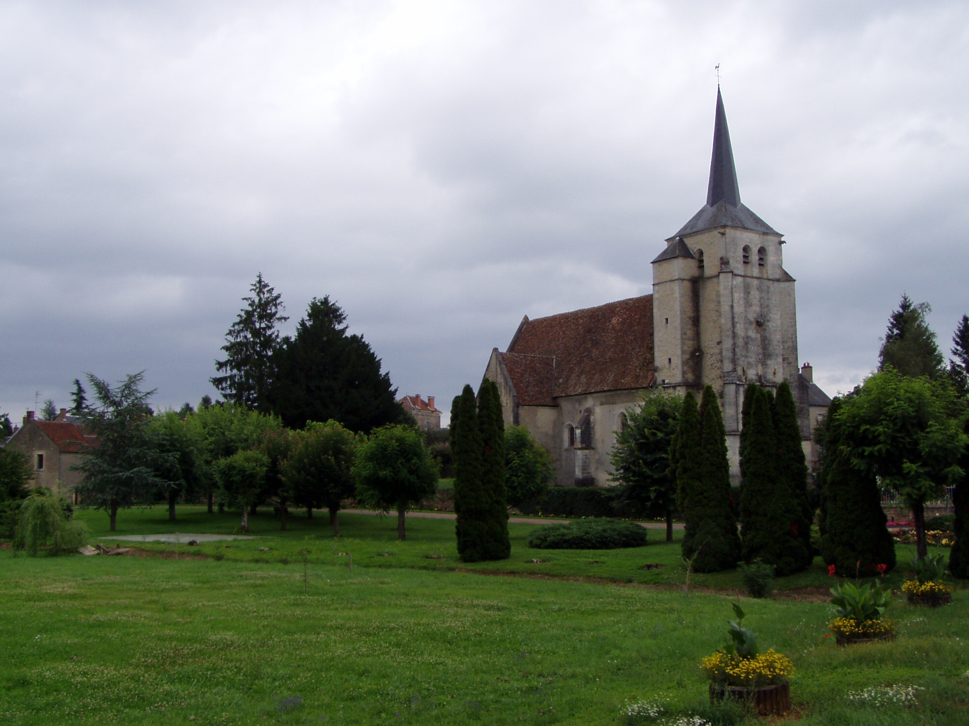 église Saint-Pierre, Vielmanay (Nièvre)